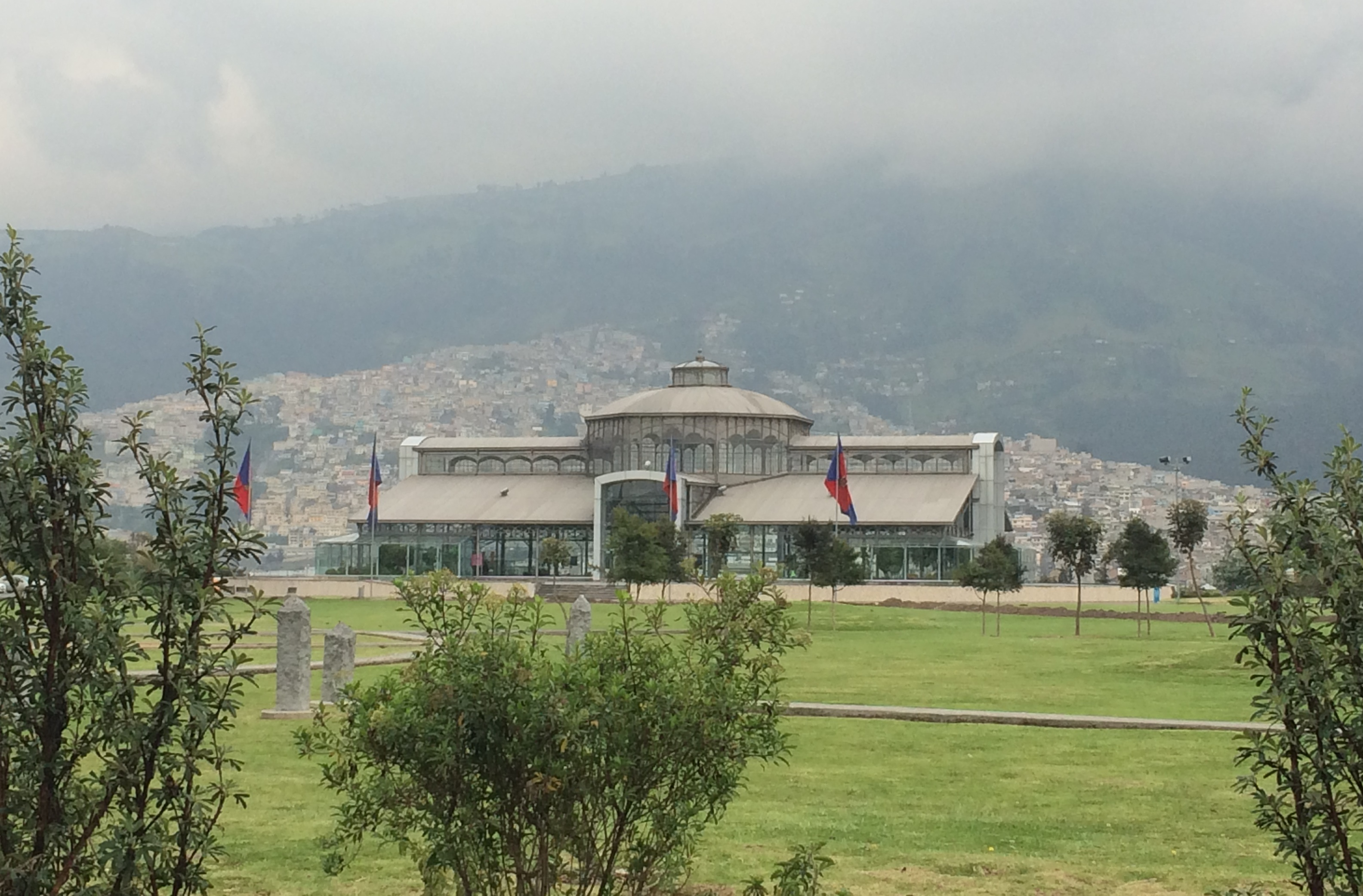 Parque Itchimbia, Quito - Equador